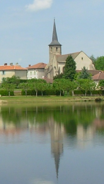 Flavignac, église